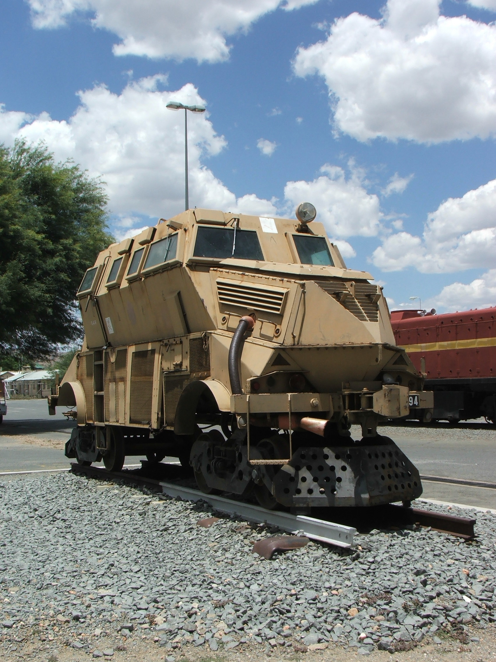 Panzerfahrzeug aus der Zeit der südafrikanischen Besetzung im TransNamib-Museum in Windhoek, Aufnahme: Marco Schweig, November 2006, Einstellung in Wikipedia Commons durch Autor genehmigt